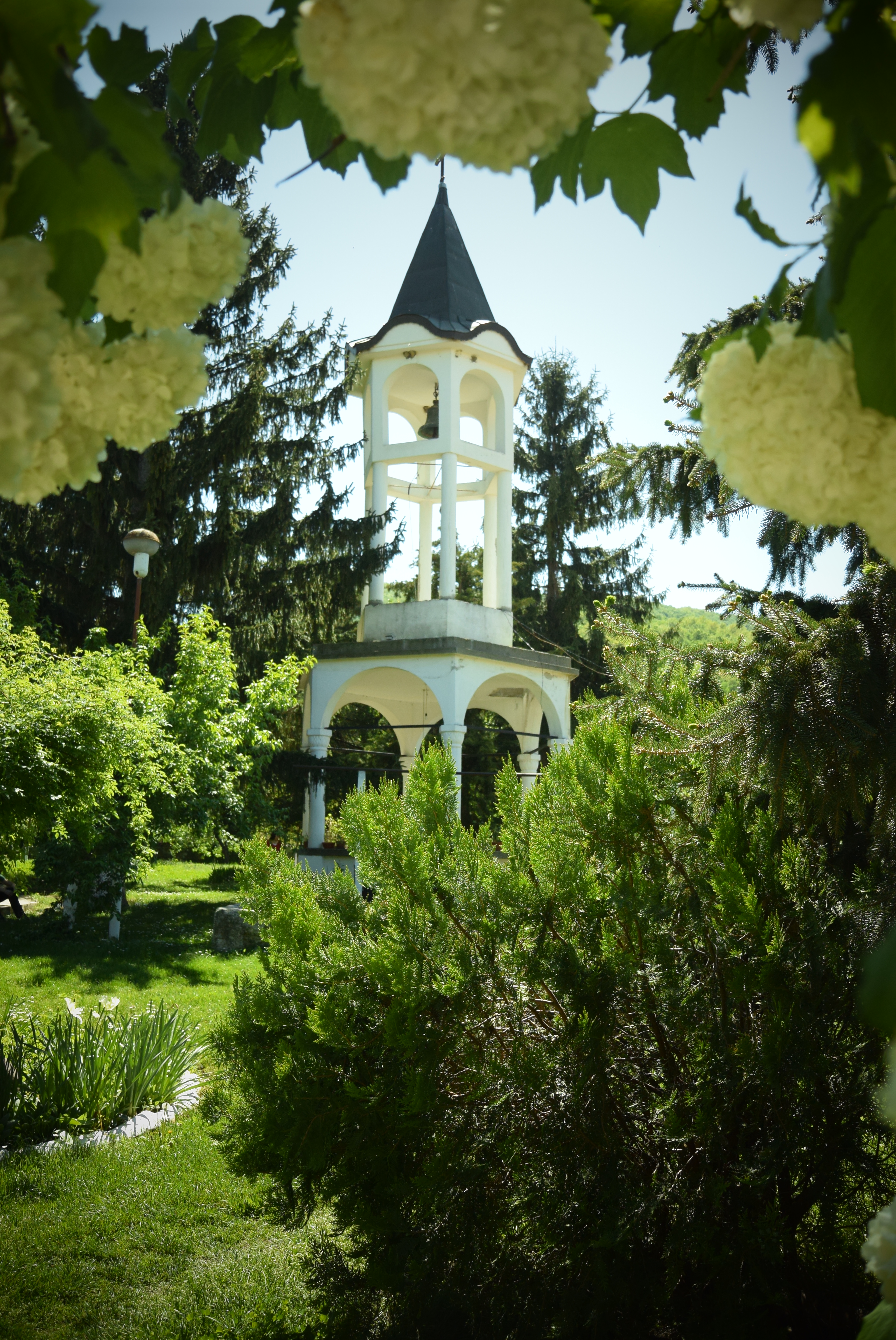 Капиновски водопад